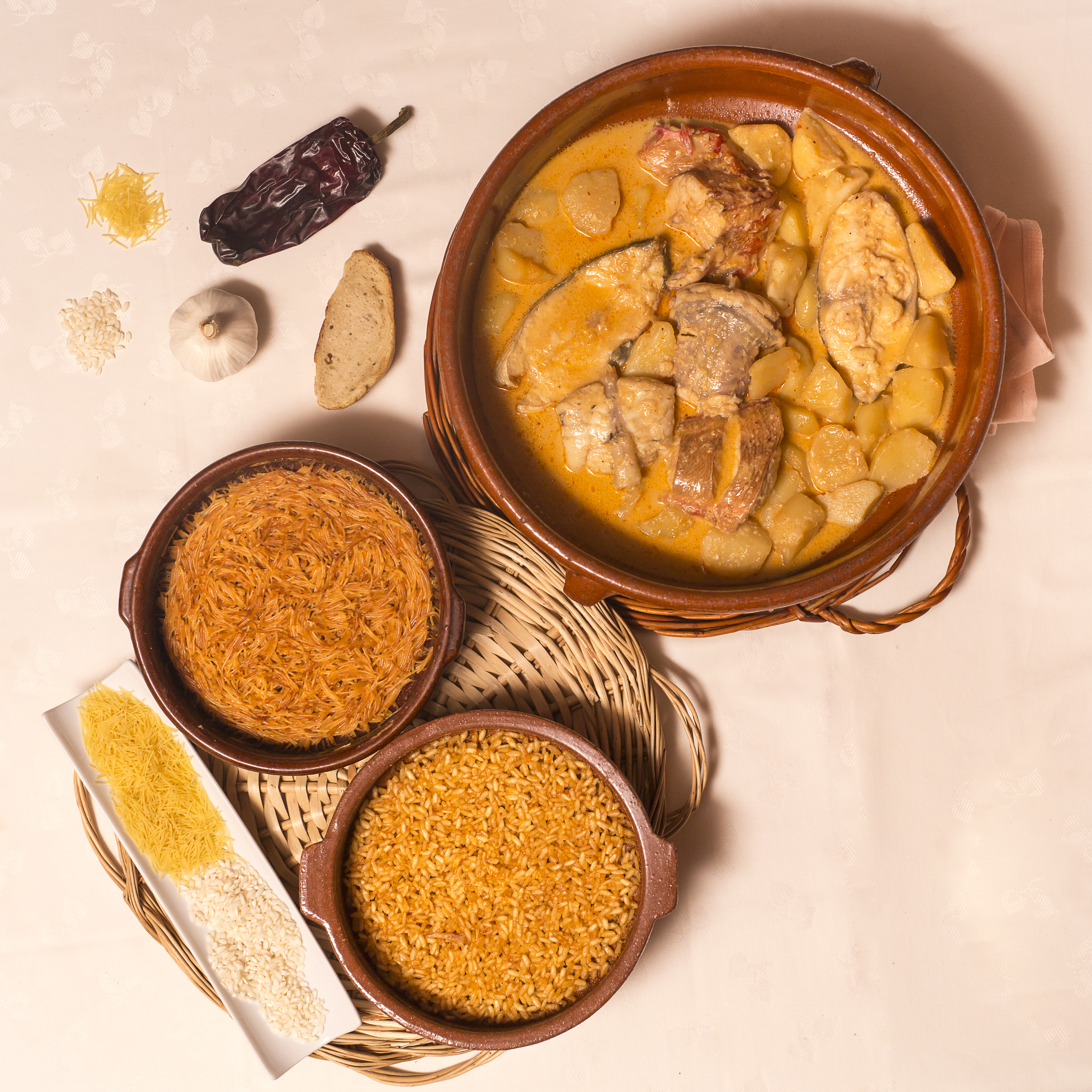 L'Arrossejat de Calafell (c) Gabriel Mestre Photography